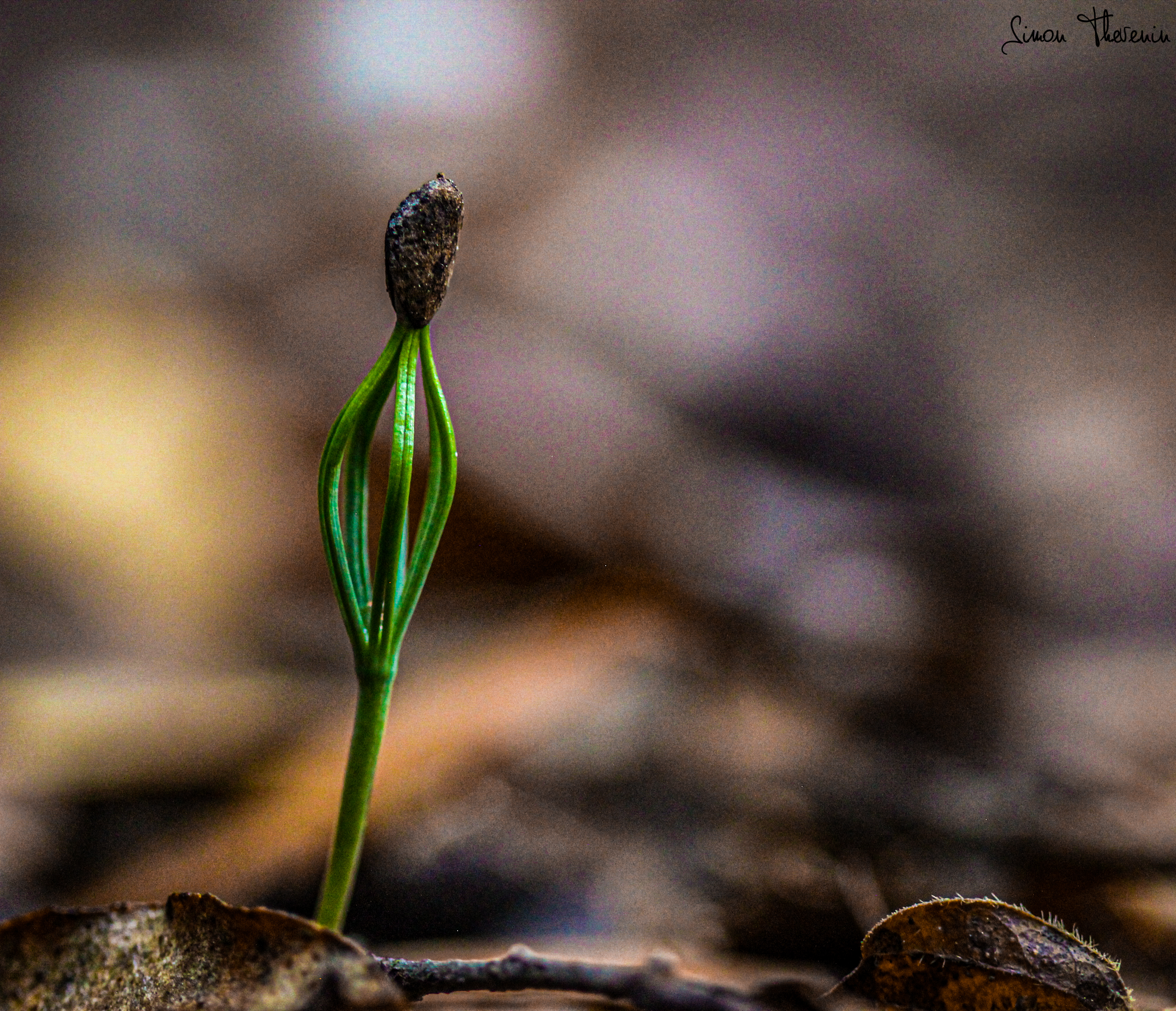 Pinus halepensis (Pin d'Alep) au stade juvénile pris en proxy photographie par Simon Thevenin à Rognes le 3 novembre 2019